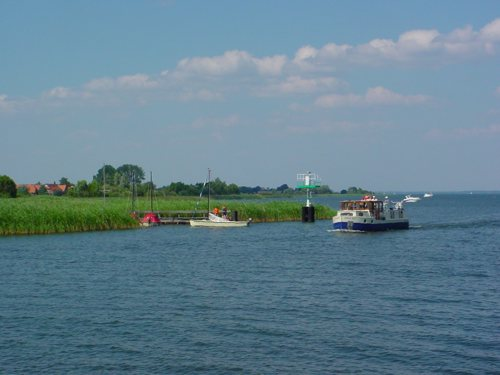 Müritz, second largest lake of Germany Description in de wikipedia Beschreibung: Südliches Ende der Müritz bei Zielow, von der kleinen Müritz aus gesehen Quelle: Fotografiert August 2004 Fotograf: Reinhard Kraasch Copyright Status: GNU Freie Dokumentationslizenz